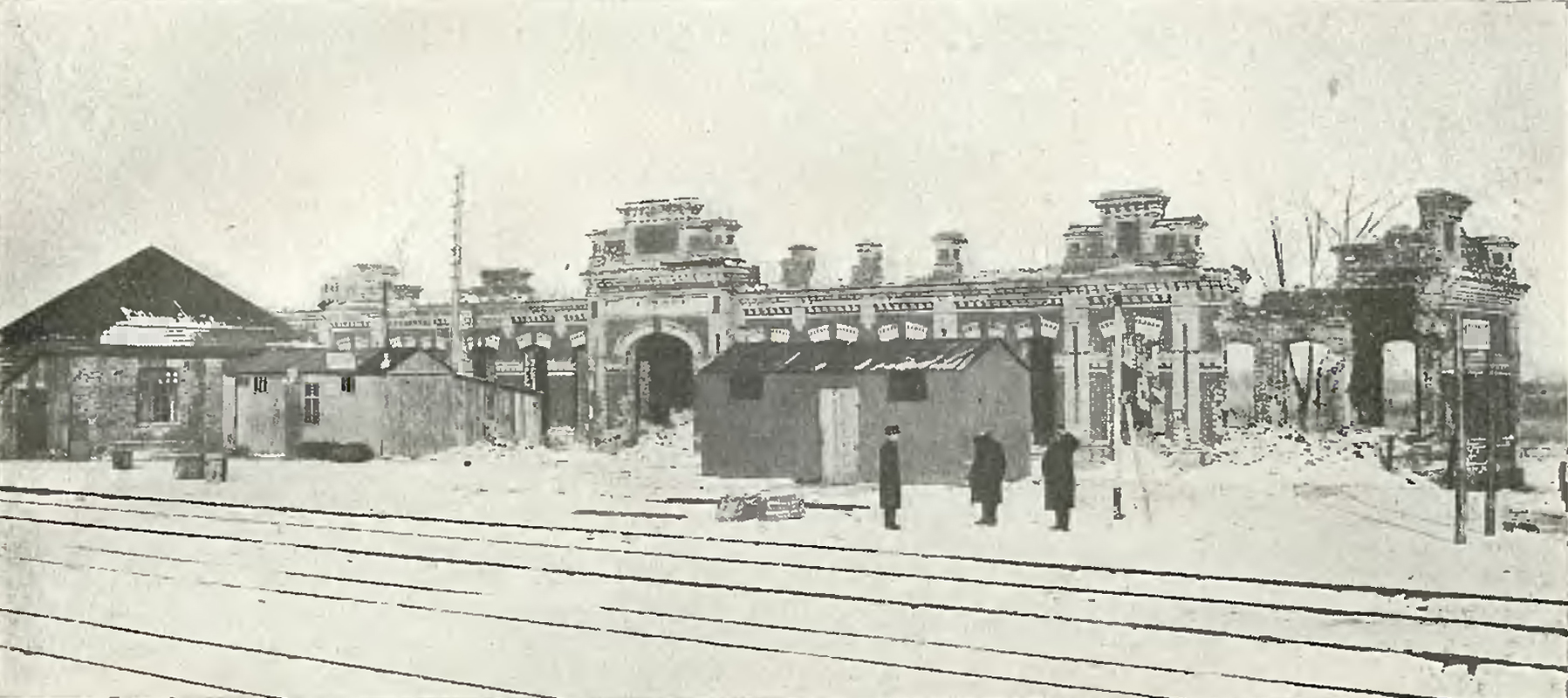 Беларуская (тарашкевіца): Смаргонь (Smarhoń), вуліца Вакзальная (vulica Vakzalnaja). Чыгуначная станцыя